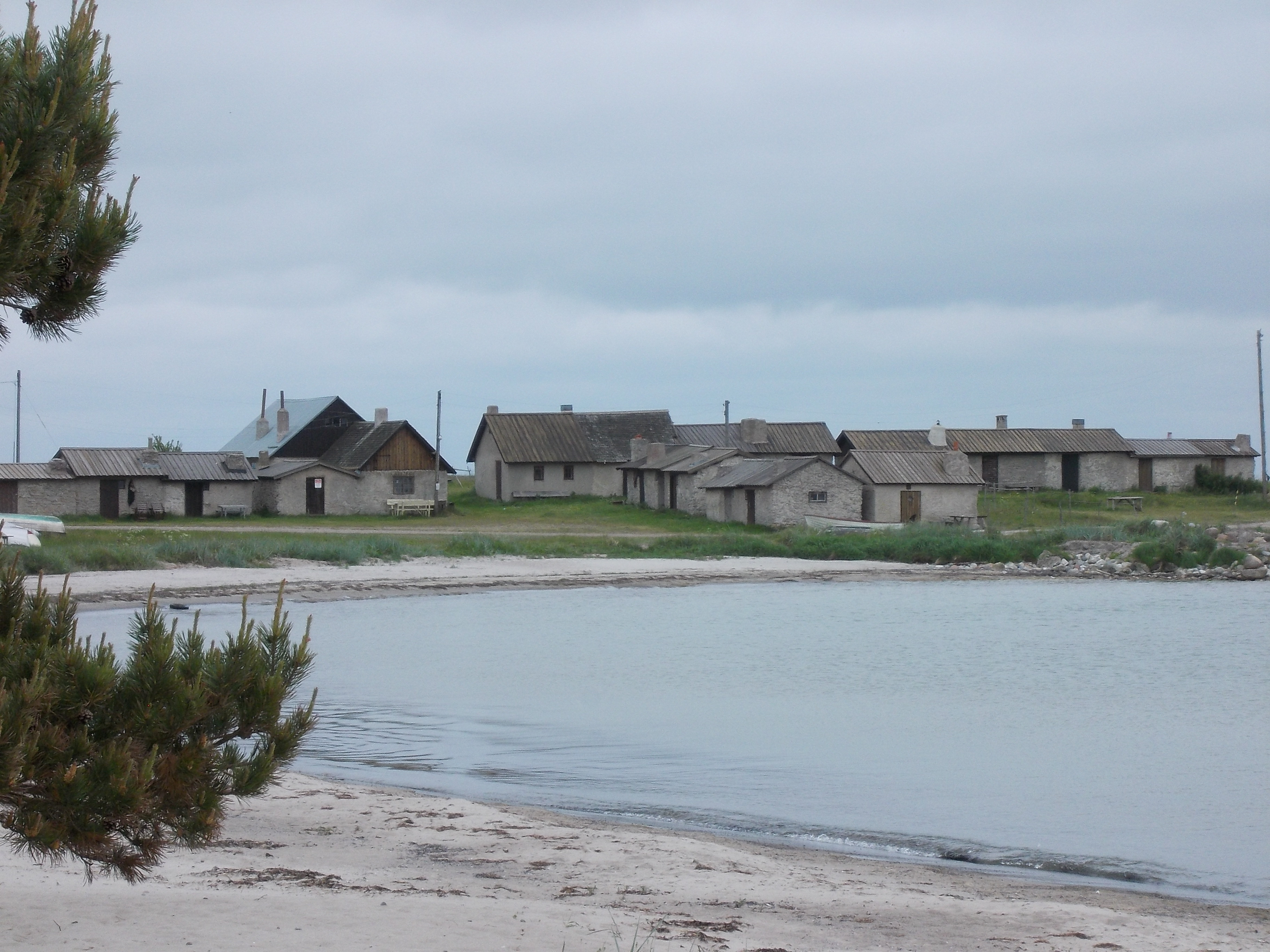 Grynge är ett fiskeläge på Gotlands sydöstra kust.